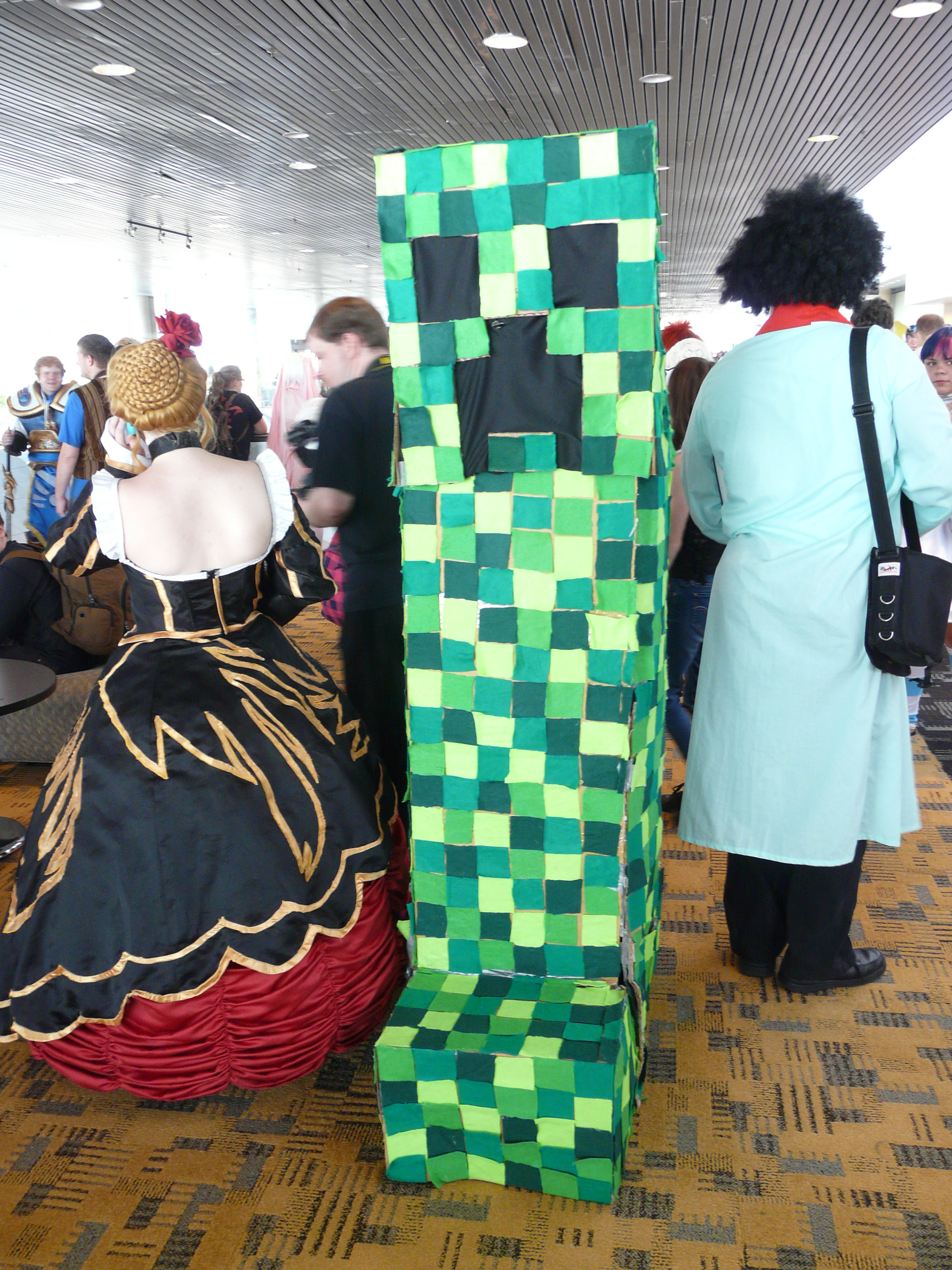 Otakon 2012 cosplay